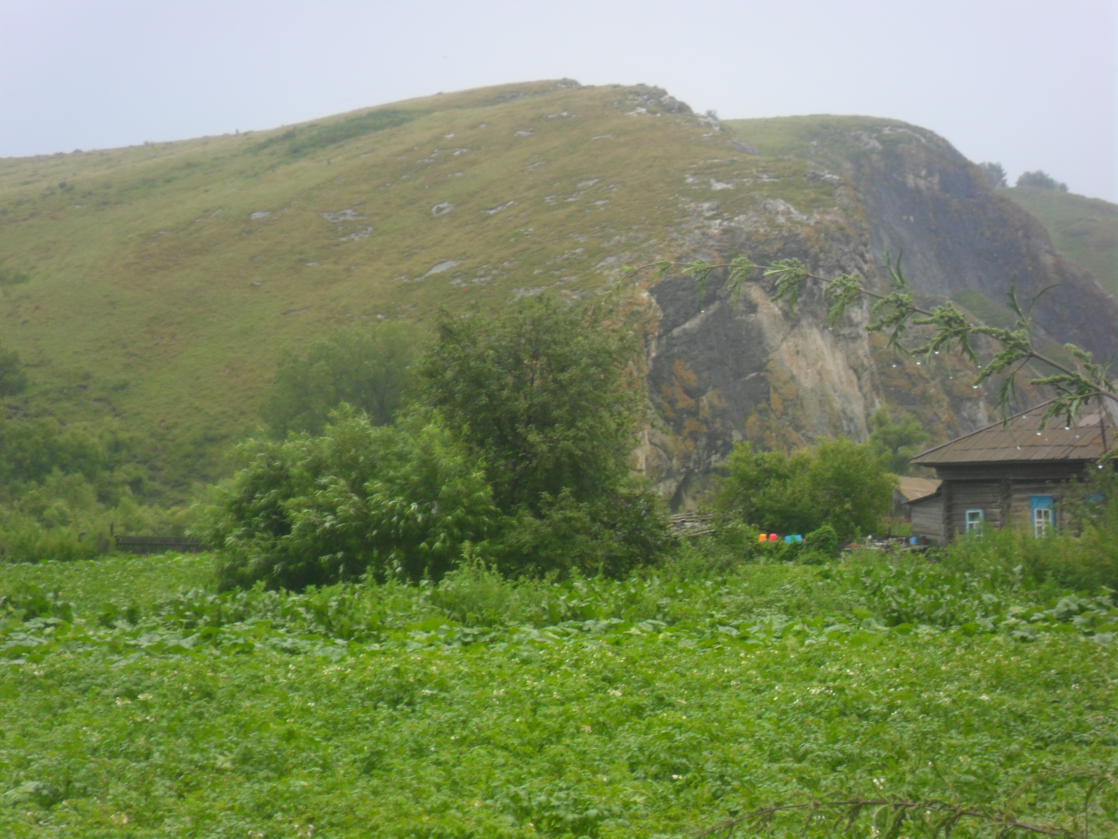 вид из Сибирячихи